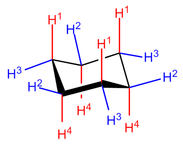 Cyclohexaanconformatie met nummering van waterstofatomen